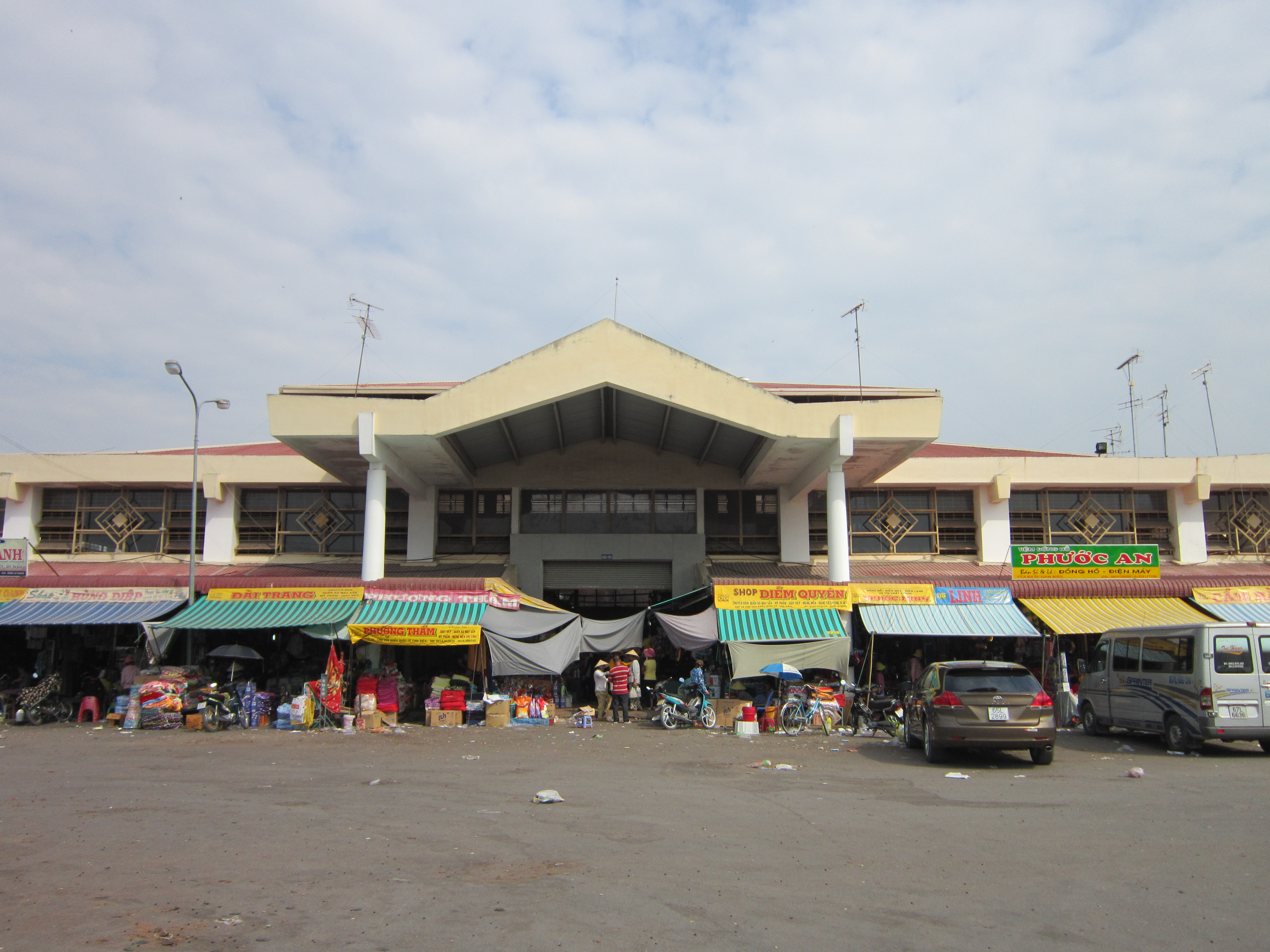 Chợ Tịnh Biên là ngôi chợ lớn nhất của huyện Tịnh Biên, thuộc tỉnh An Giang, Việt Nam.